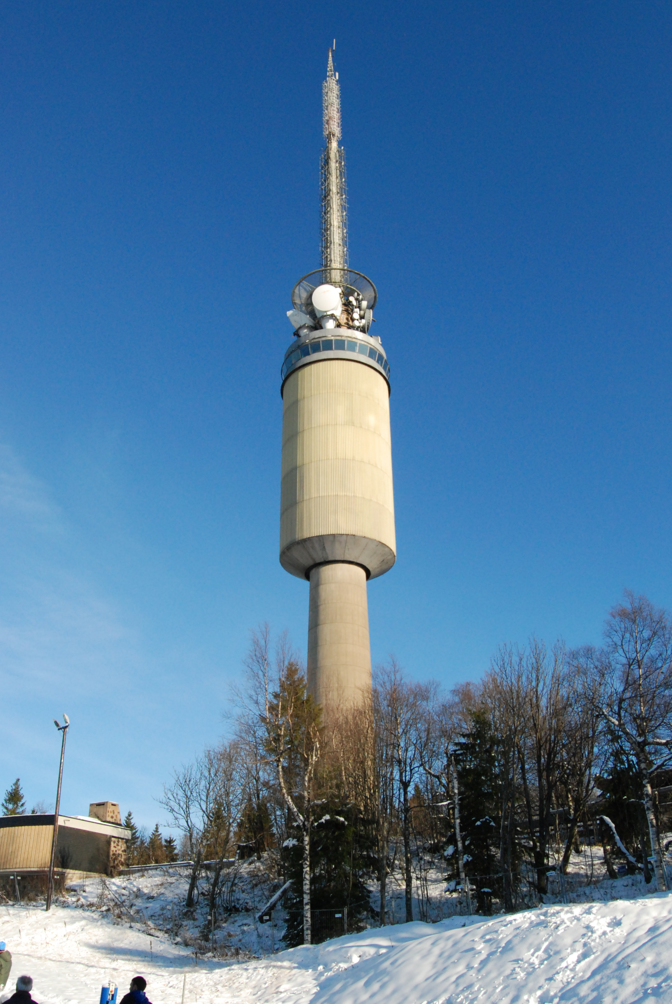 Tryvannstårnet in Oslo, Norway